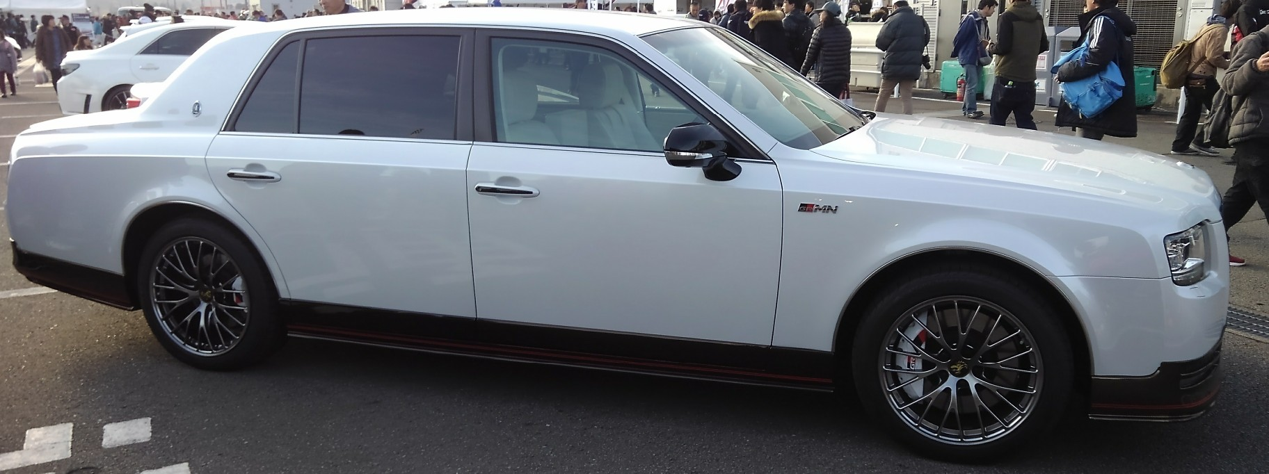 TGRFにて、豊田章男の所有するセンチュリーGRMN